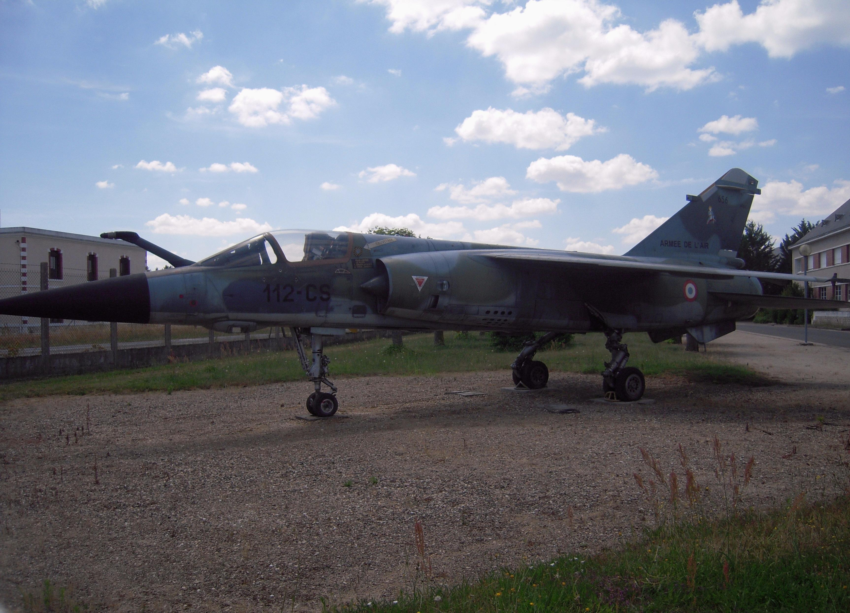 Mirage F1 CR, exposé à la BA 273 de Pruniers